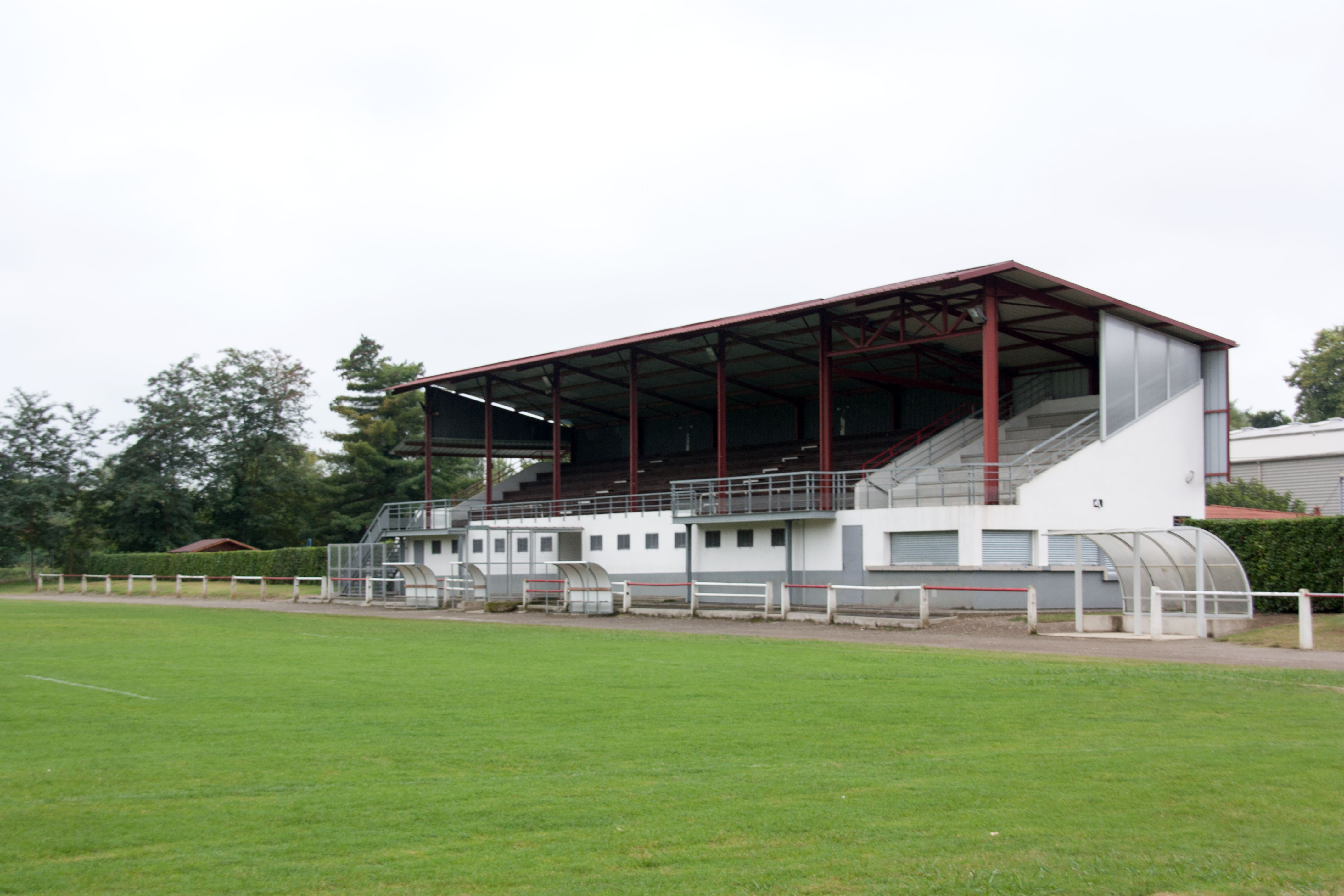 Stade de rugby, Maubourguet, Hautes-Pyrénées, France